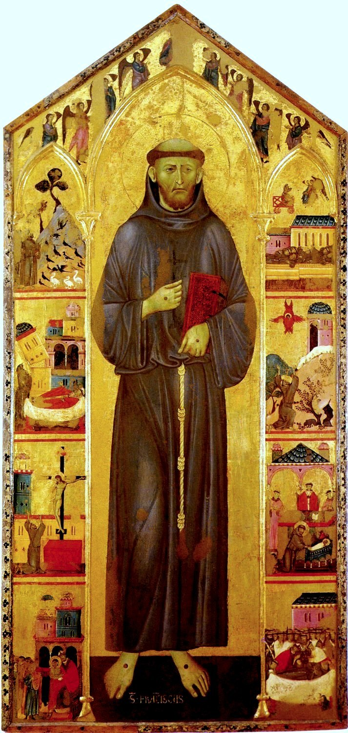 Guido di Graziano. St.Francisc and Stories from his Life.